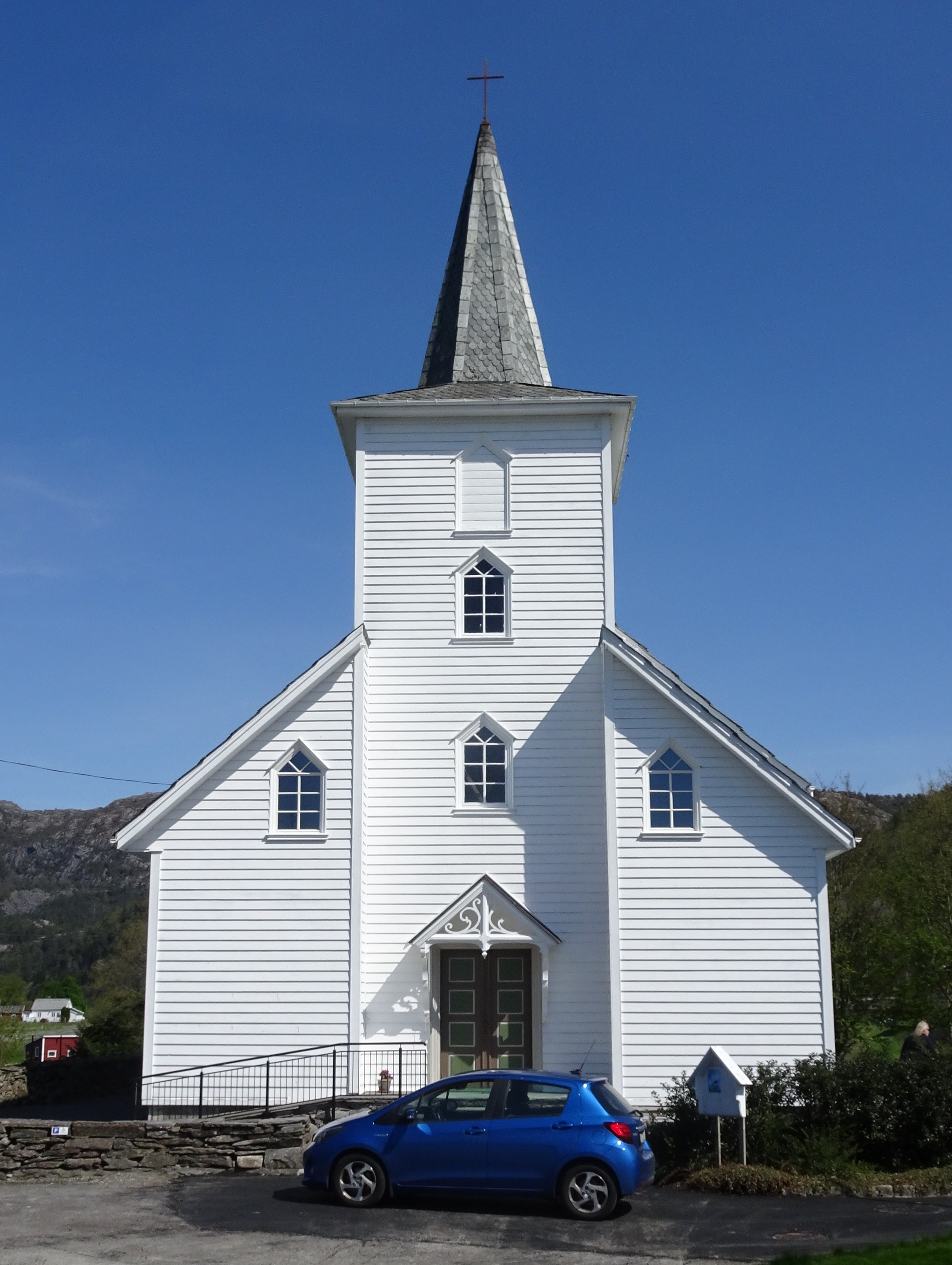 Valestrand kirke